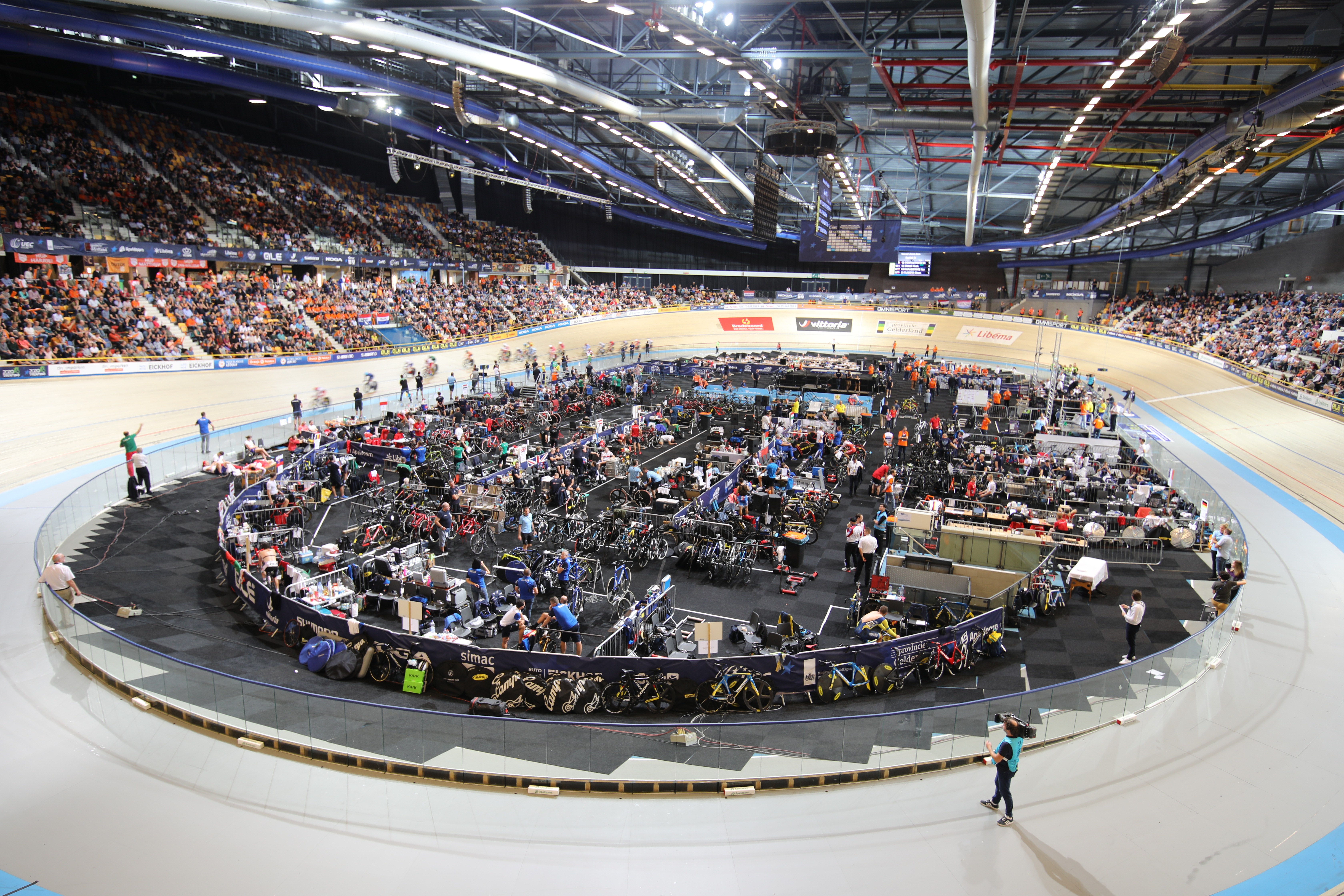 Blick in den Innenraum